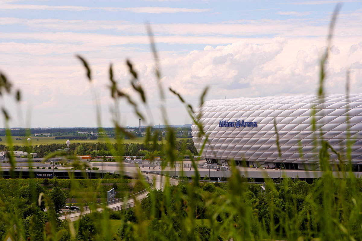 Allianz Arena, Munchen